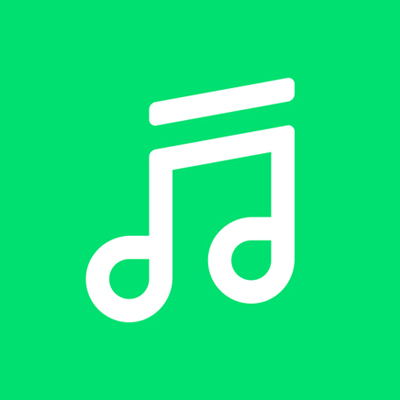 日本発の定額制音楽配信サービスLINEMUSICのロゴマーク。